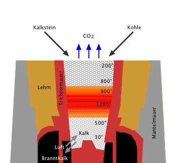 Schema eines Kalktrichterofens selbst erstellt von pitichinaccio - 1. Dez. 2005